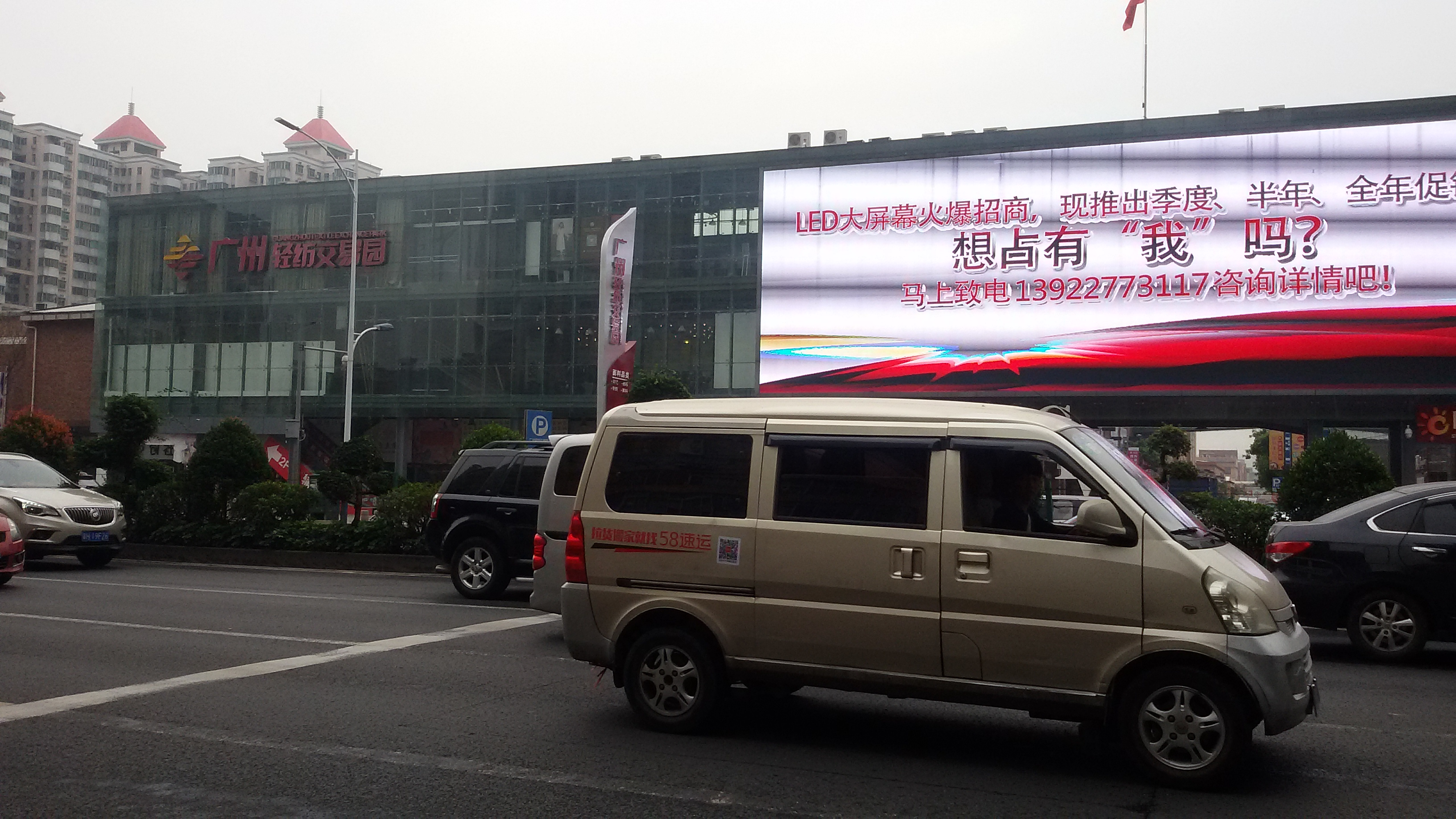 粵語: 廣州輕紡交易園